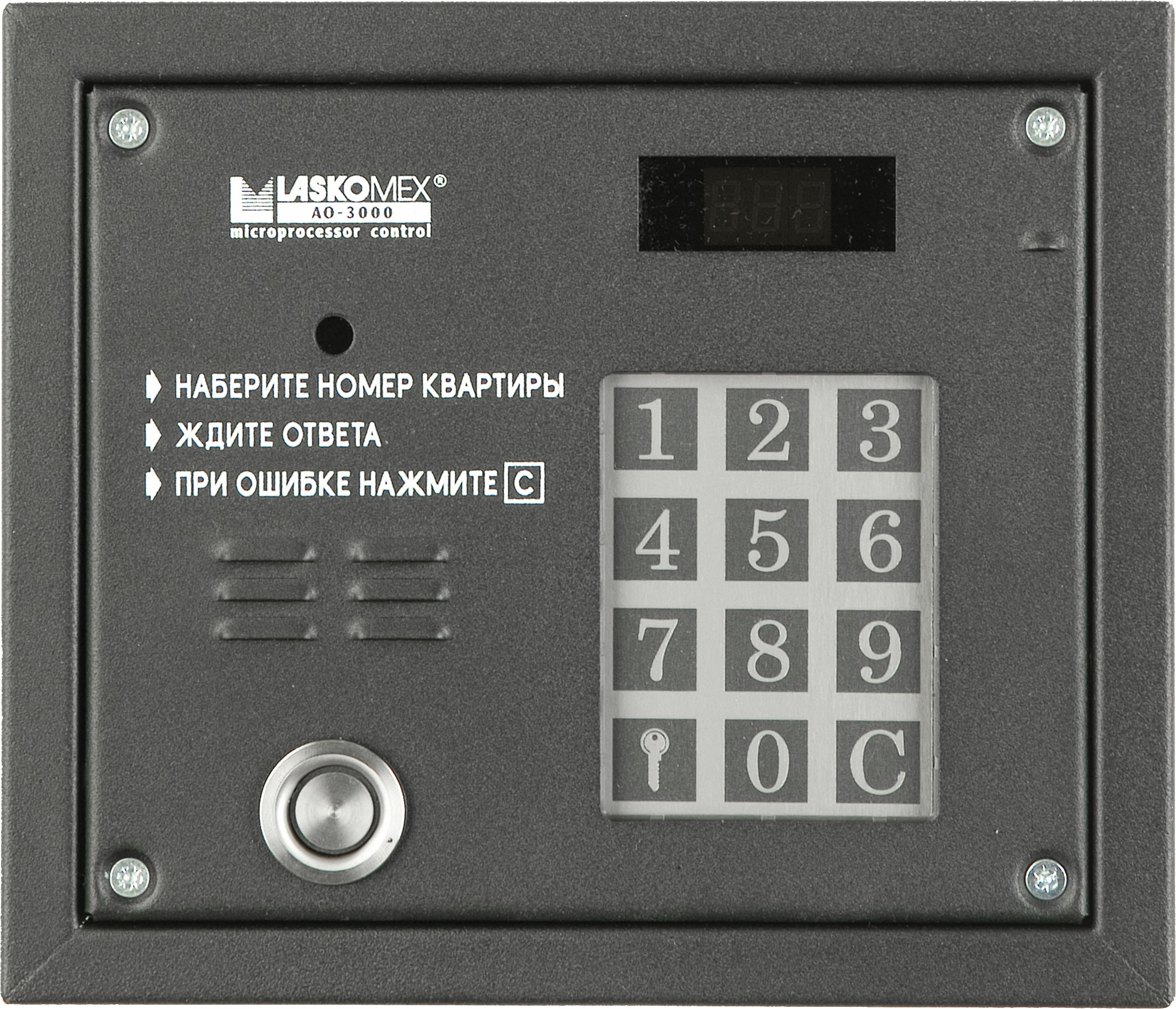 видеодомофон Laskomex